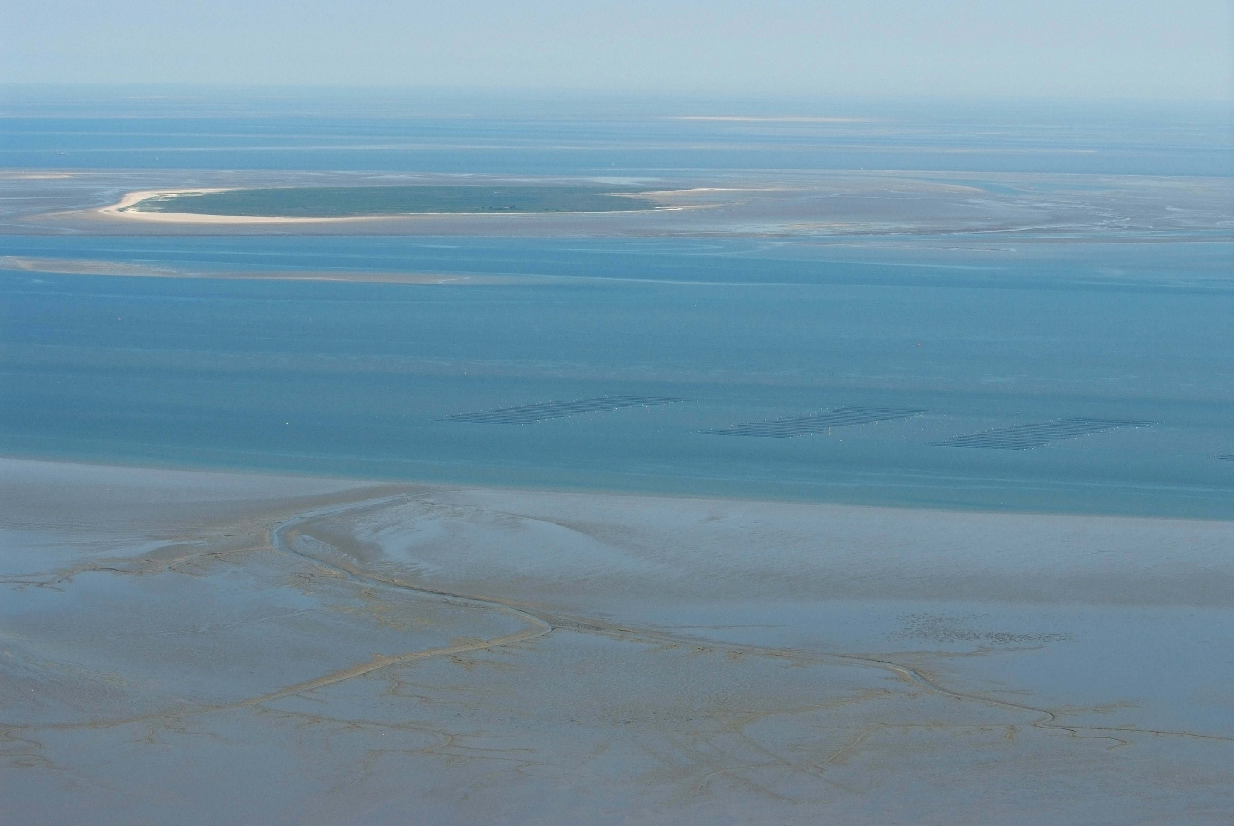 Innenjade (hinten), Austernzucht (MItte) und Prile (vorne); Fotoflug vom Flugplatz Nordholz-Spieka über Cuxhaven und Wilhelmshaven